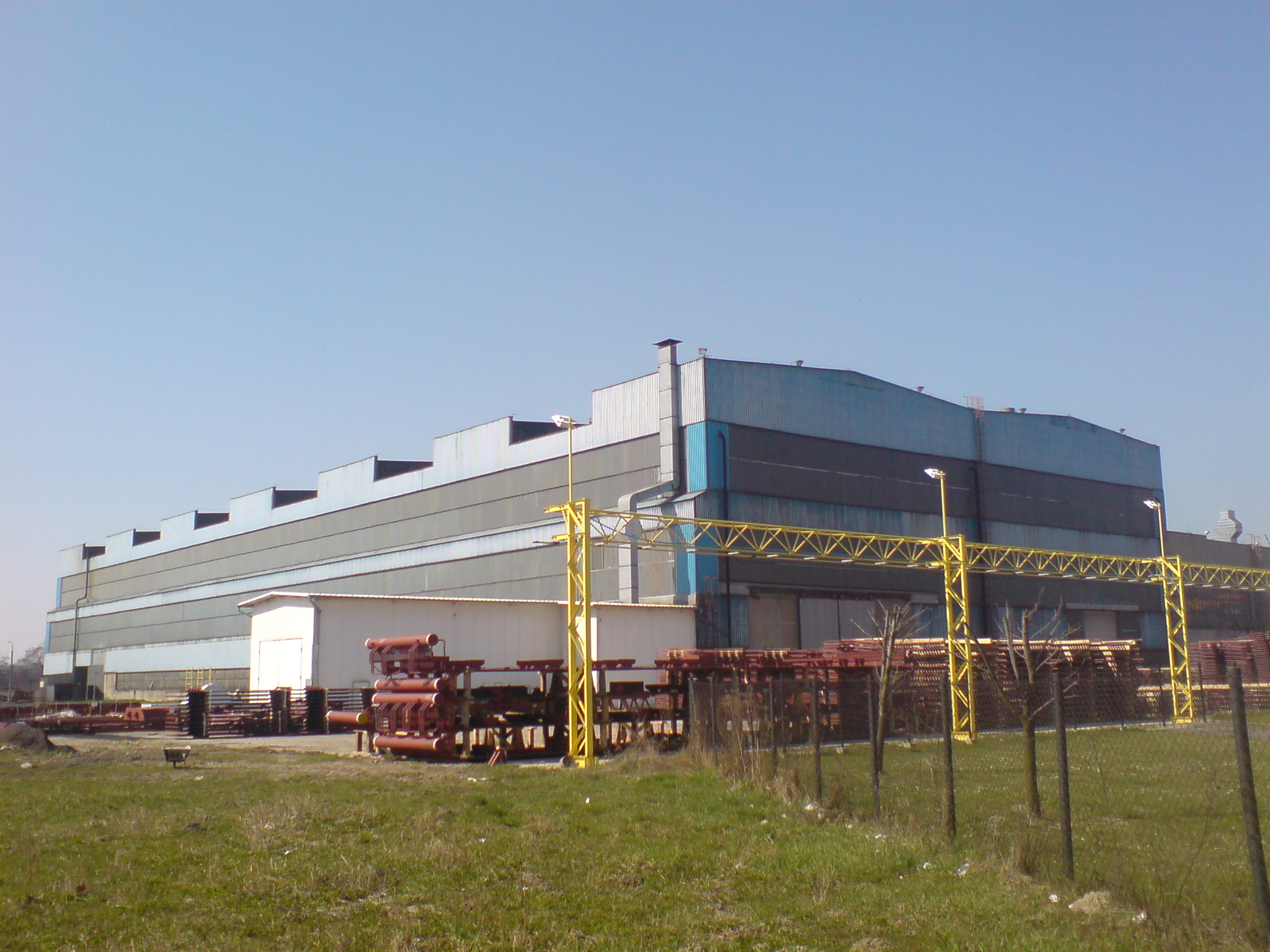 Fabryka Kotłów Rafako S.A. w Raciborzu